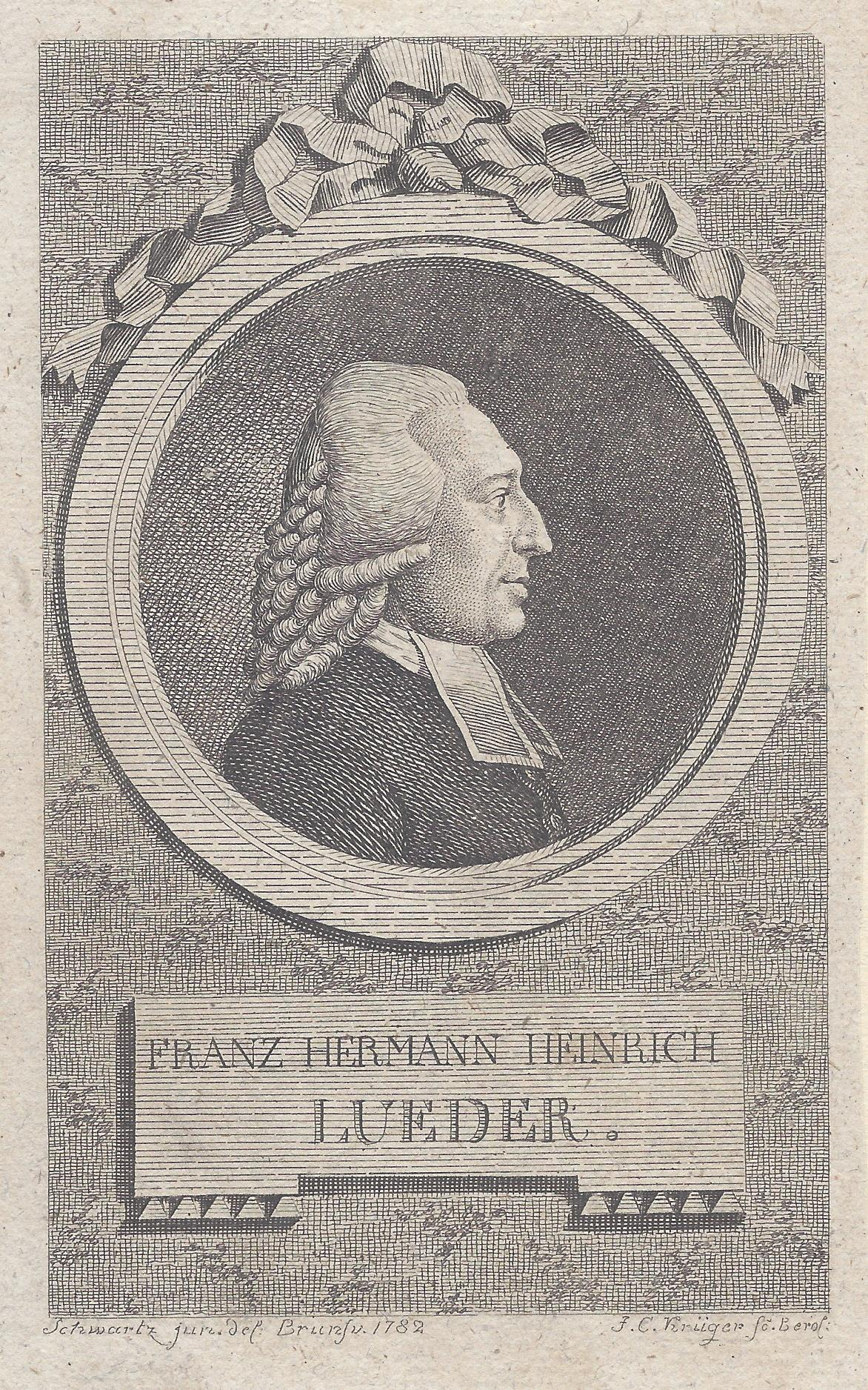 Johann Conrad Krüger (Stecher)nach Schwartz junior: Franz Hermann Heinrich Lueder, Kupferstich, Braunschweig 1782.